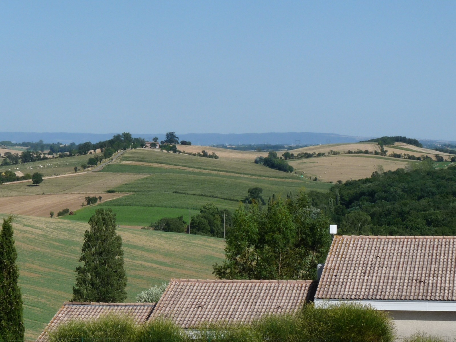 Vue vers la Montagne noire et le Lauragais, Aurin, Haute-Garonne, France